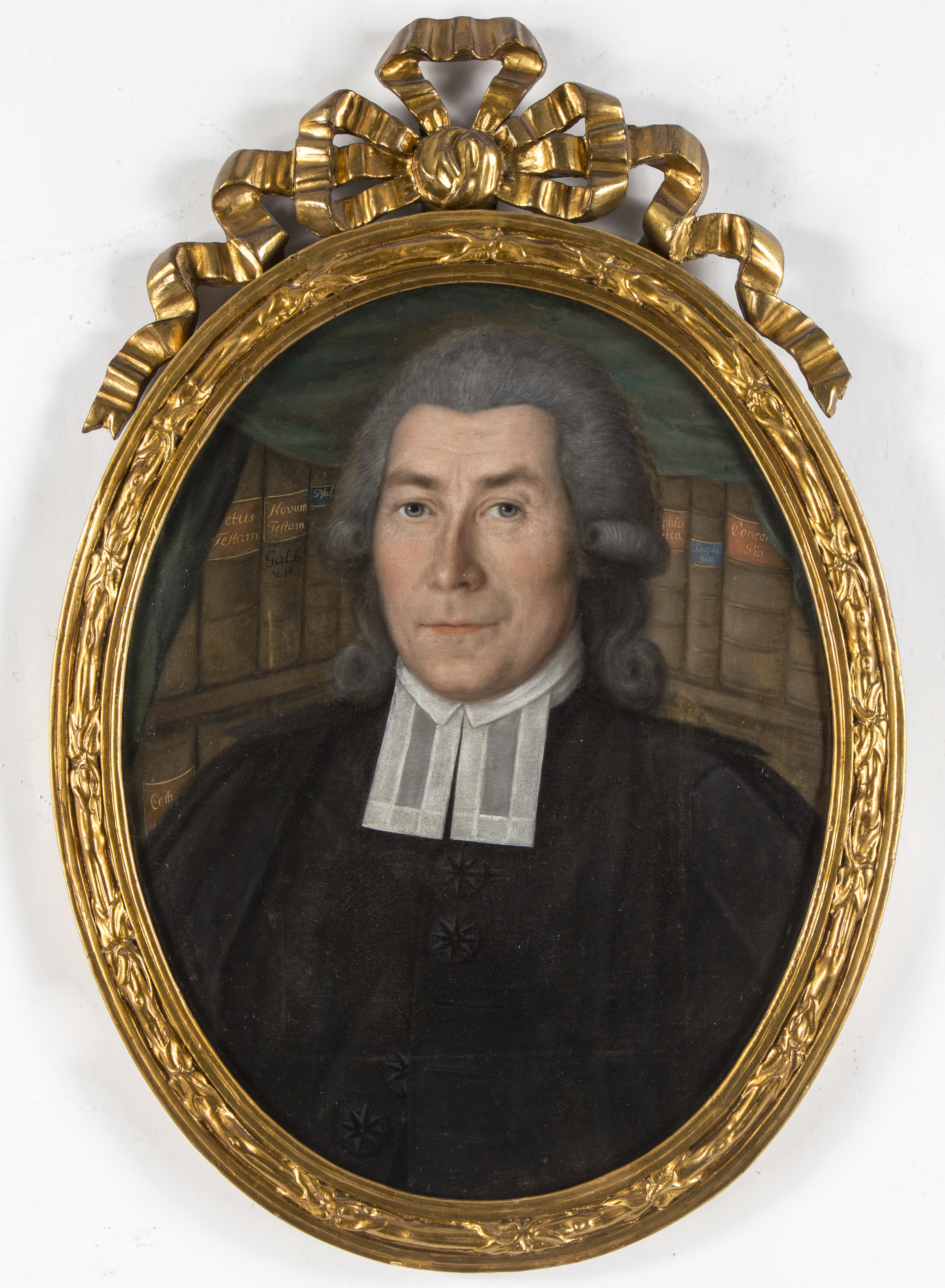 Porträtt av kyrkoherde Wilhelm Fredrik Nibelius (1754-1830) iklädd prästrock med elva om halsen. Bakom Nibelius syns en bokhylla med böcker vars innehåll är av teologisk natur. Målning från ca 1790 av okänd.